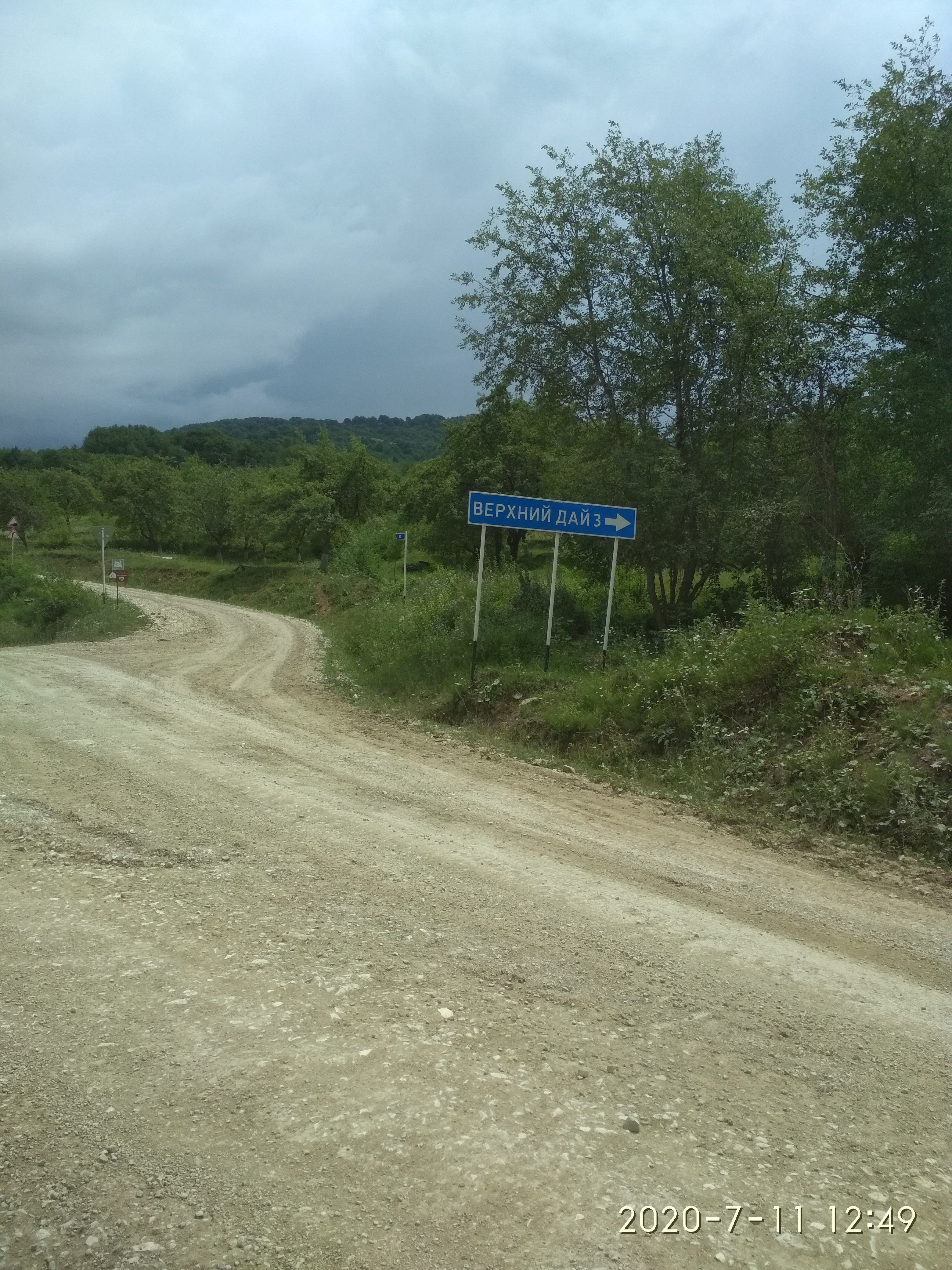 Нохчийн: Лакха ДӀай хьажориг